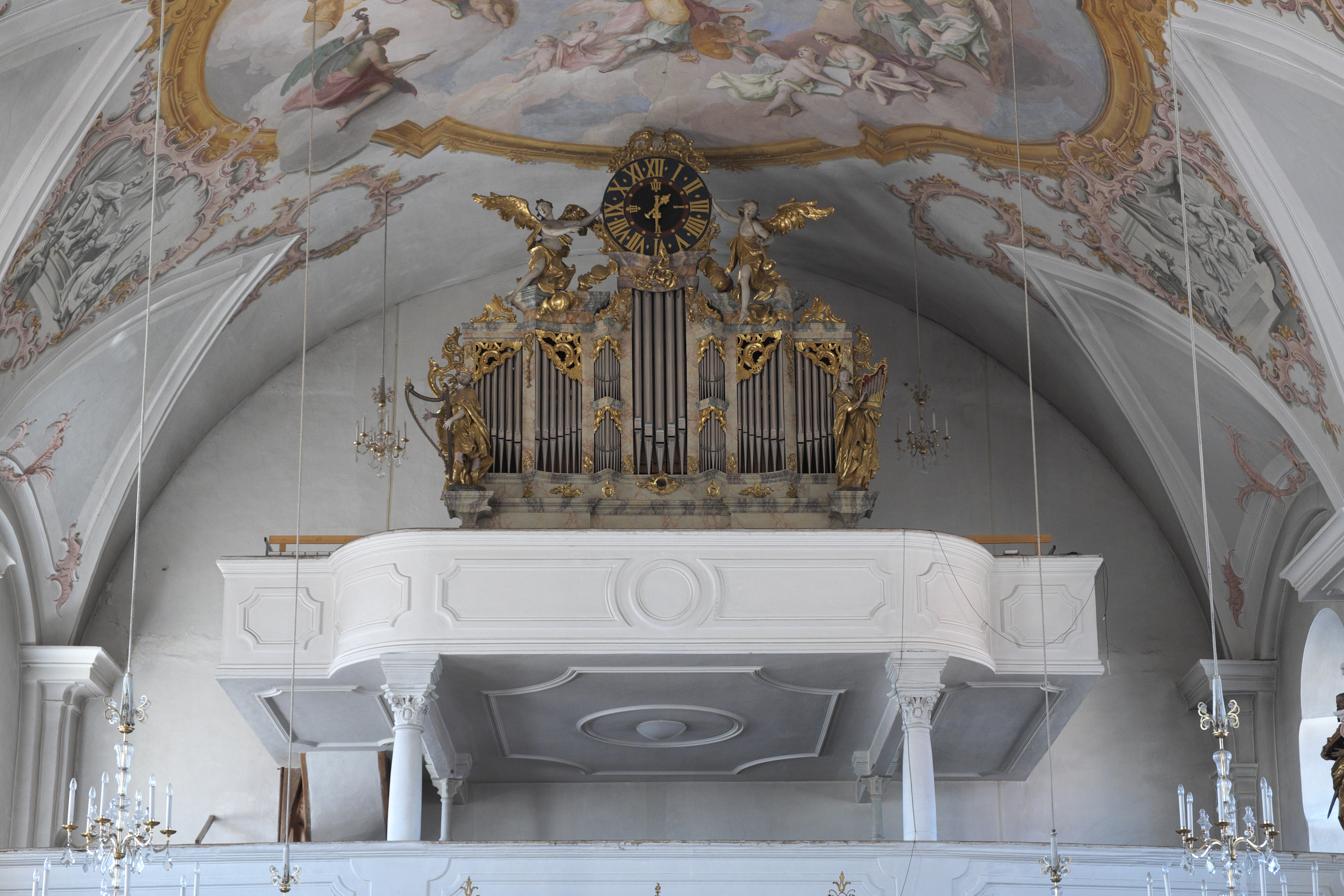 Katholische Pfarrkirche Mariä Verkündigung in Altenerding, einem Stadtteil von Erding (Bayern/Deutschland), Orgelempore